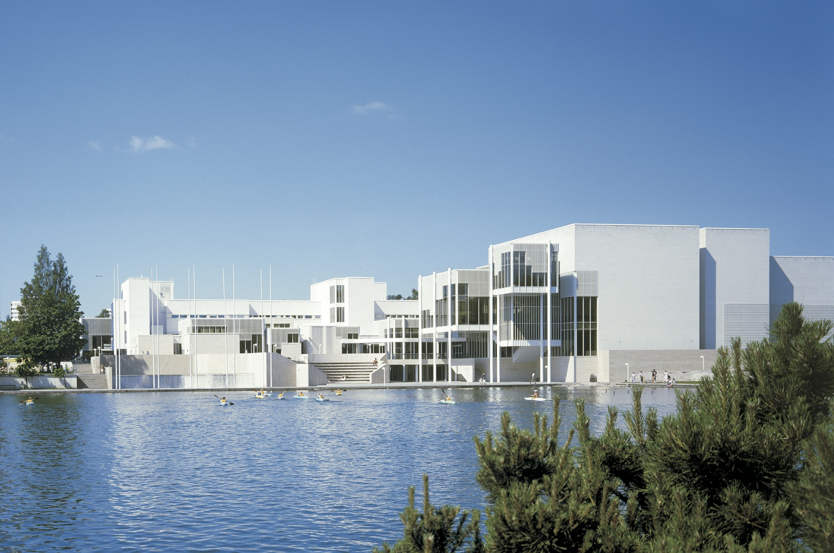 Espoon kulttuurikeskus / Arto Sipinen